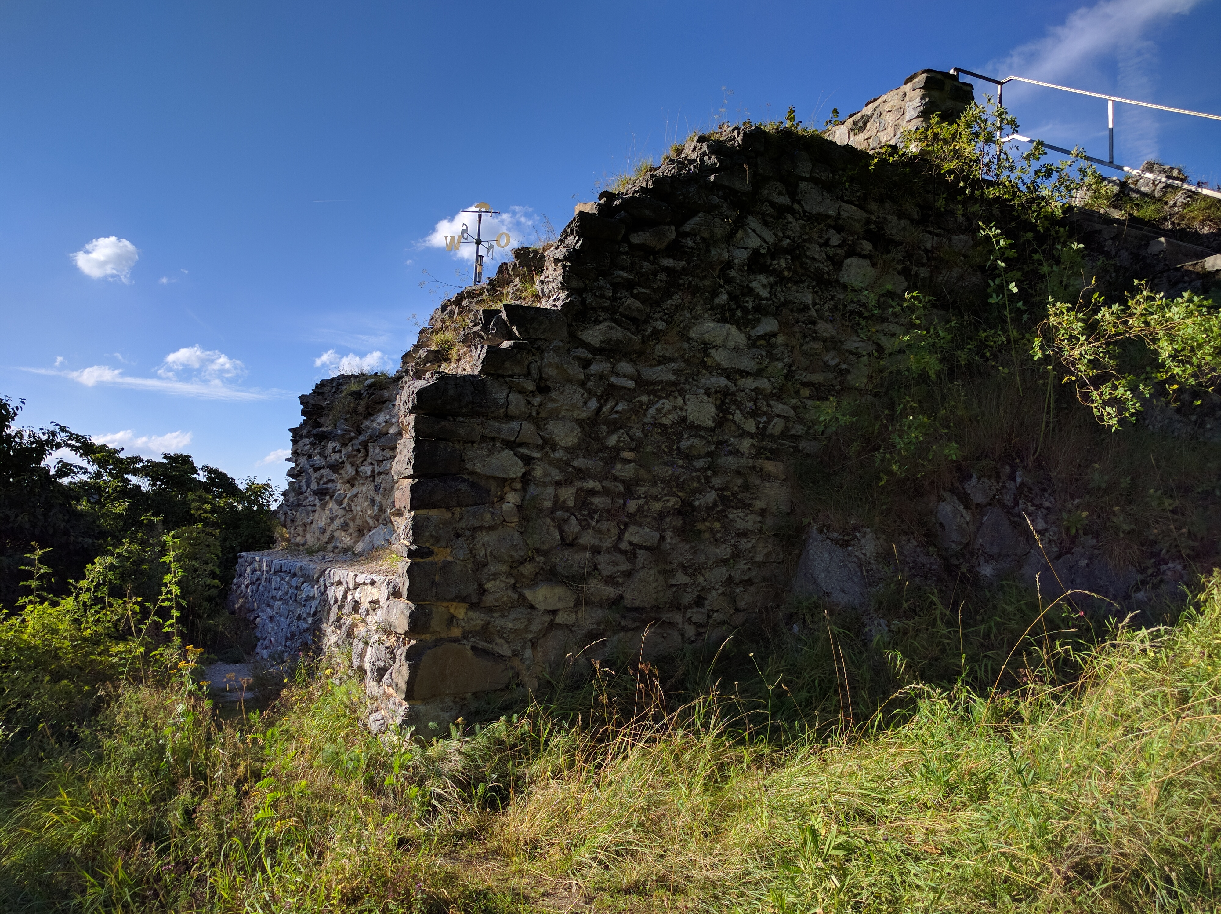 Mauerrest des Wohnturms der Burgruine Birkenfeld.